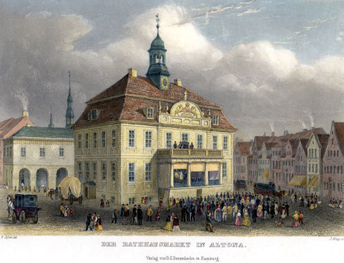 Eröffnung des Balkones am Alten Rathaus Altona 1802